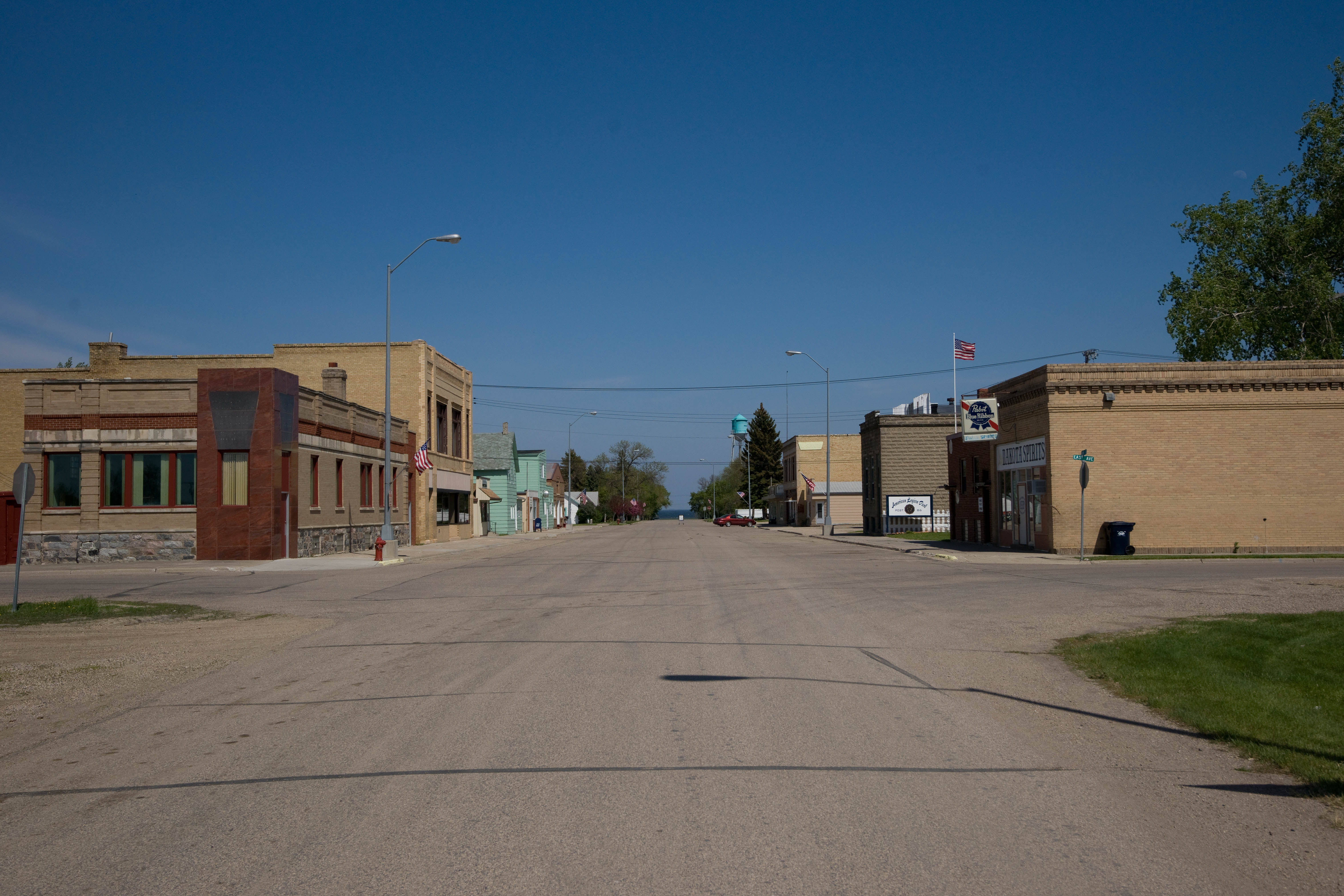 Minnewaukan, North Dakota